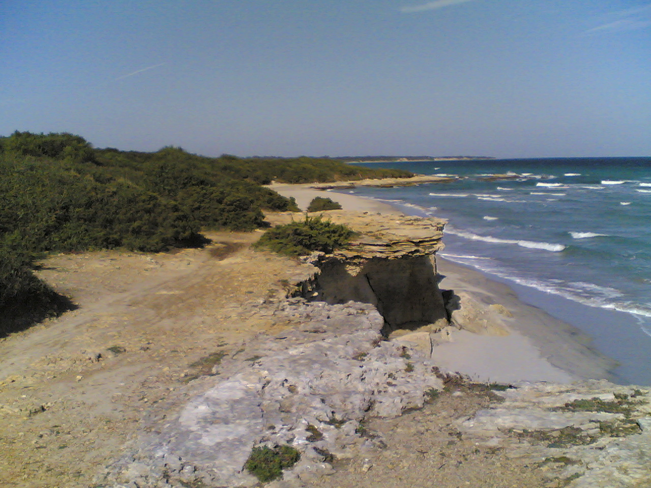 Foto del 3 novembre 2007 - Baia dei Turchi, lato nord